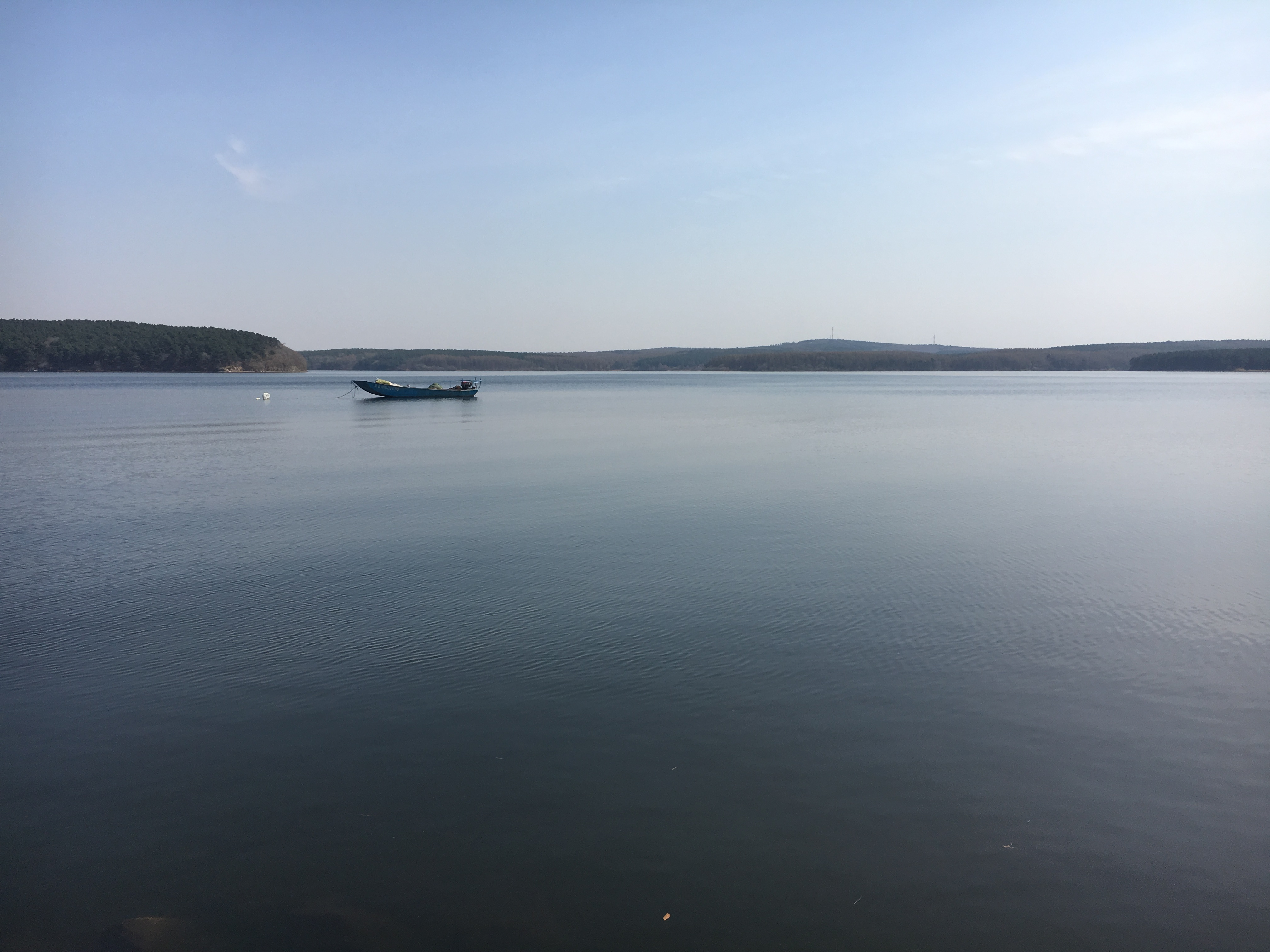 中文（中国大陆）: 净月潭湖面